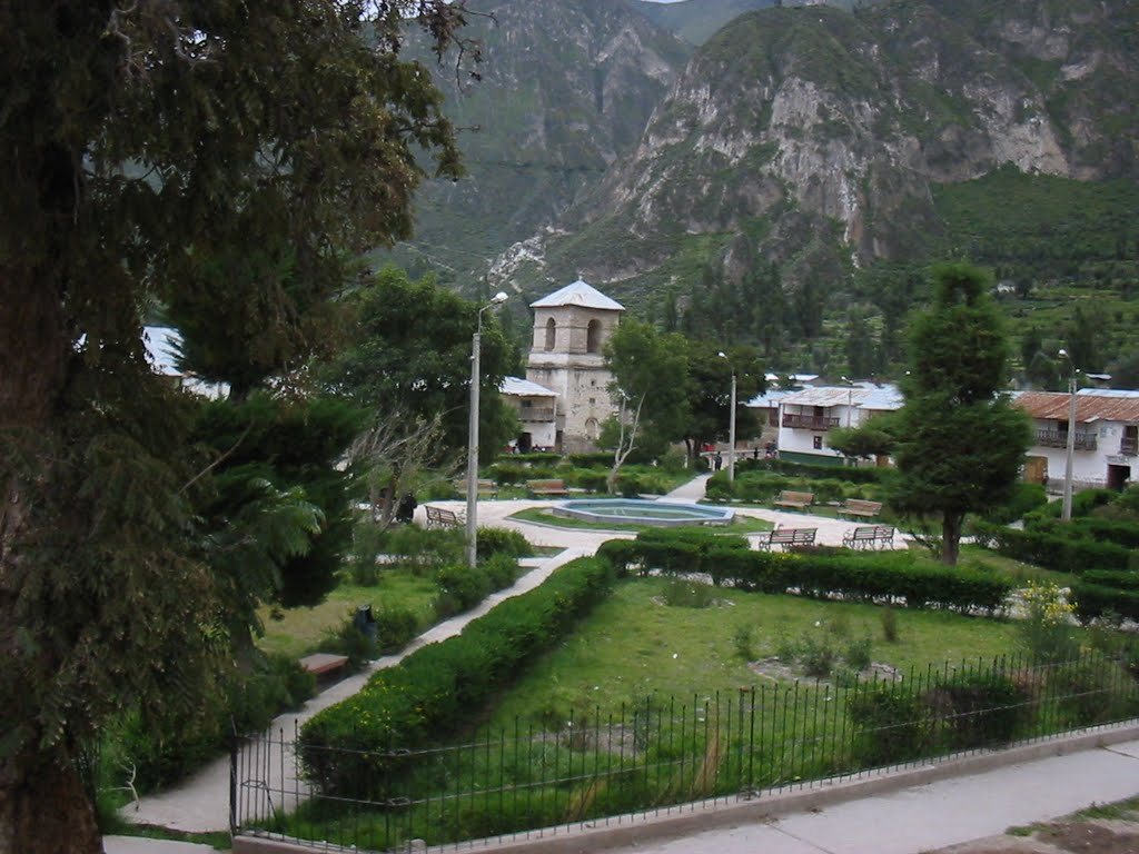 Panoramica de la Plaza de Armas del Distrito de Alca